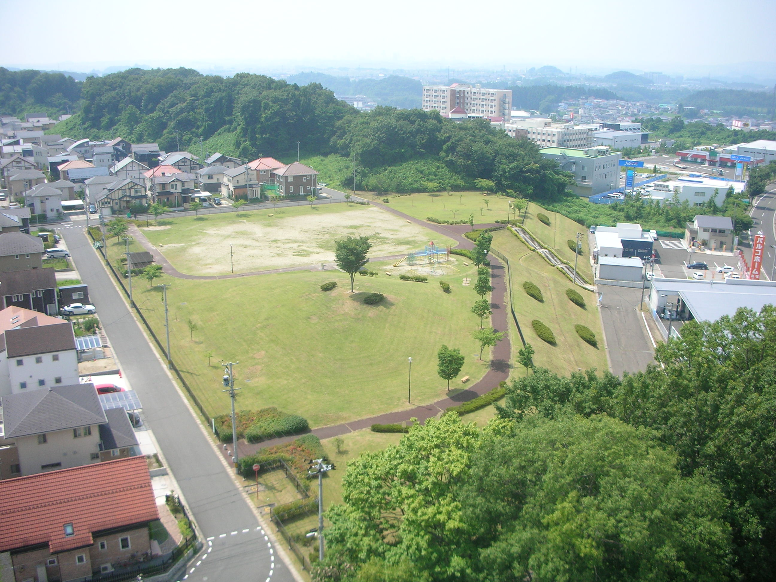 上桜木一丁目第1公園２